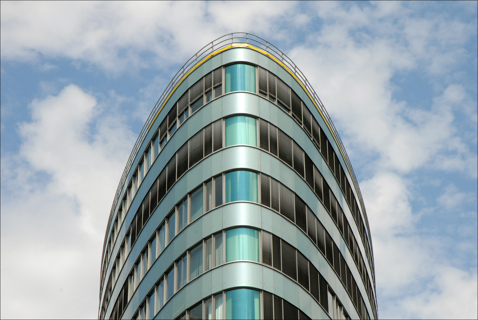 L'immeuble de bureaux et de commerces "Le Trias" se trouve au bord de la Spree. Il a été conçu par les architectes : Lucia Beringer and Günther Wawrik de Munich en 1994-1996. Les trois tours vues de la Spree sont devenues célèbres en raison de leurs formes ovales. Elles sont reliées par un bâtiment plus bas non visible sur la photographie.